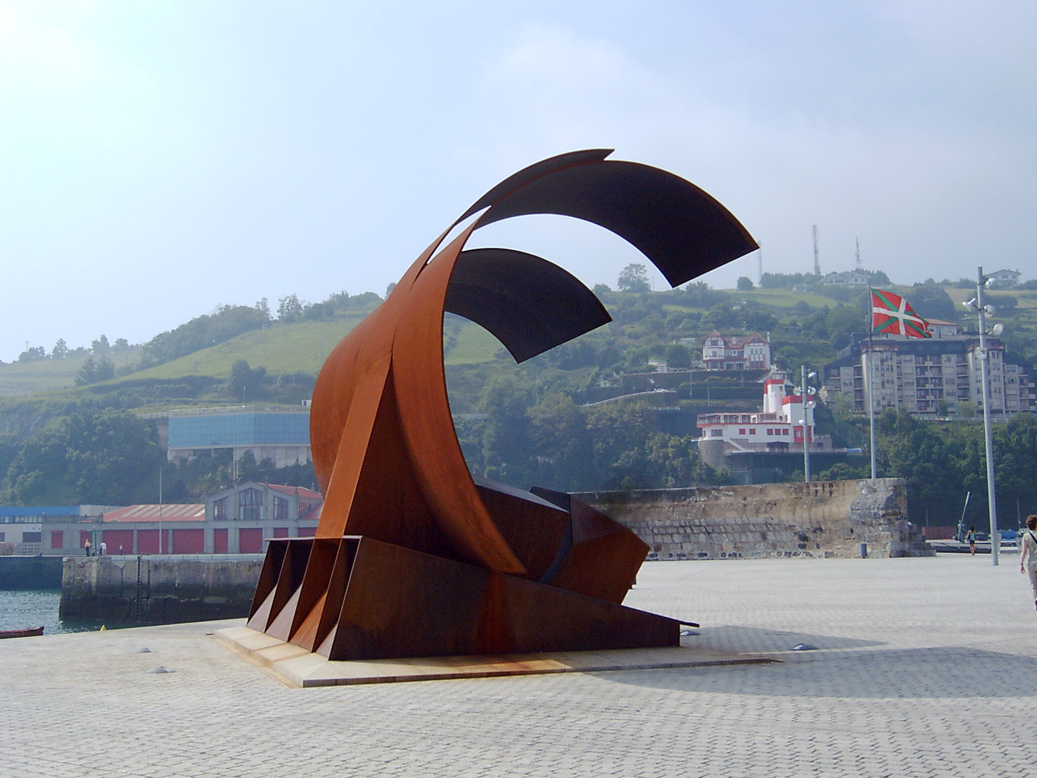 Bermeoko portu zaharreko eskultura. Bermeoko kirol portuko Nestor Basterretxearen eskultura.